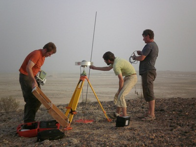 Travaux de mise en place de réseau géodésique de base